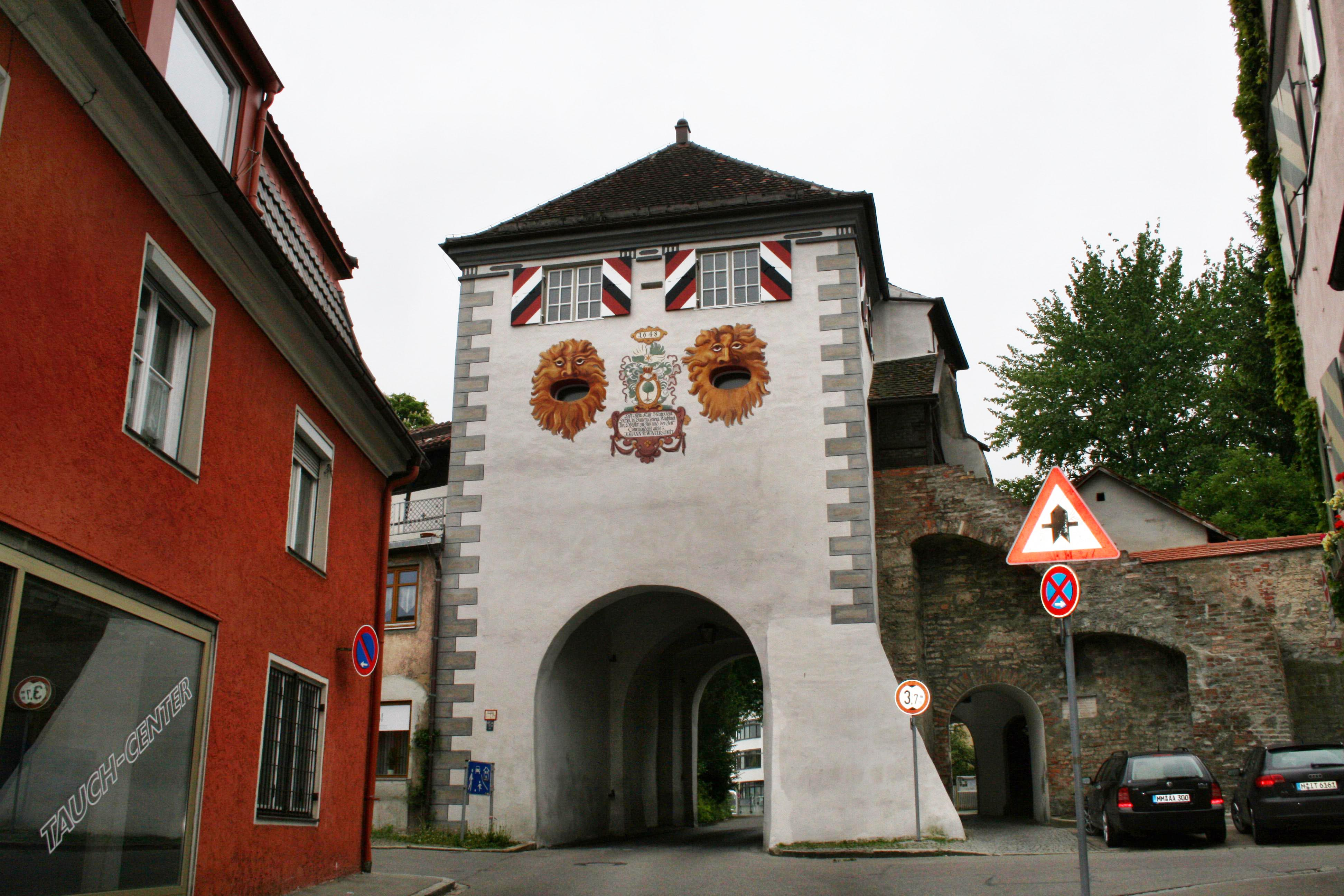 Lindauer Tor mit teilen der Stadtmauer und des Wehrgangs